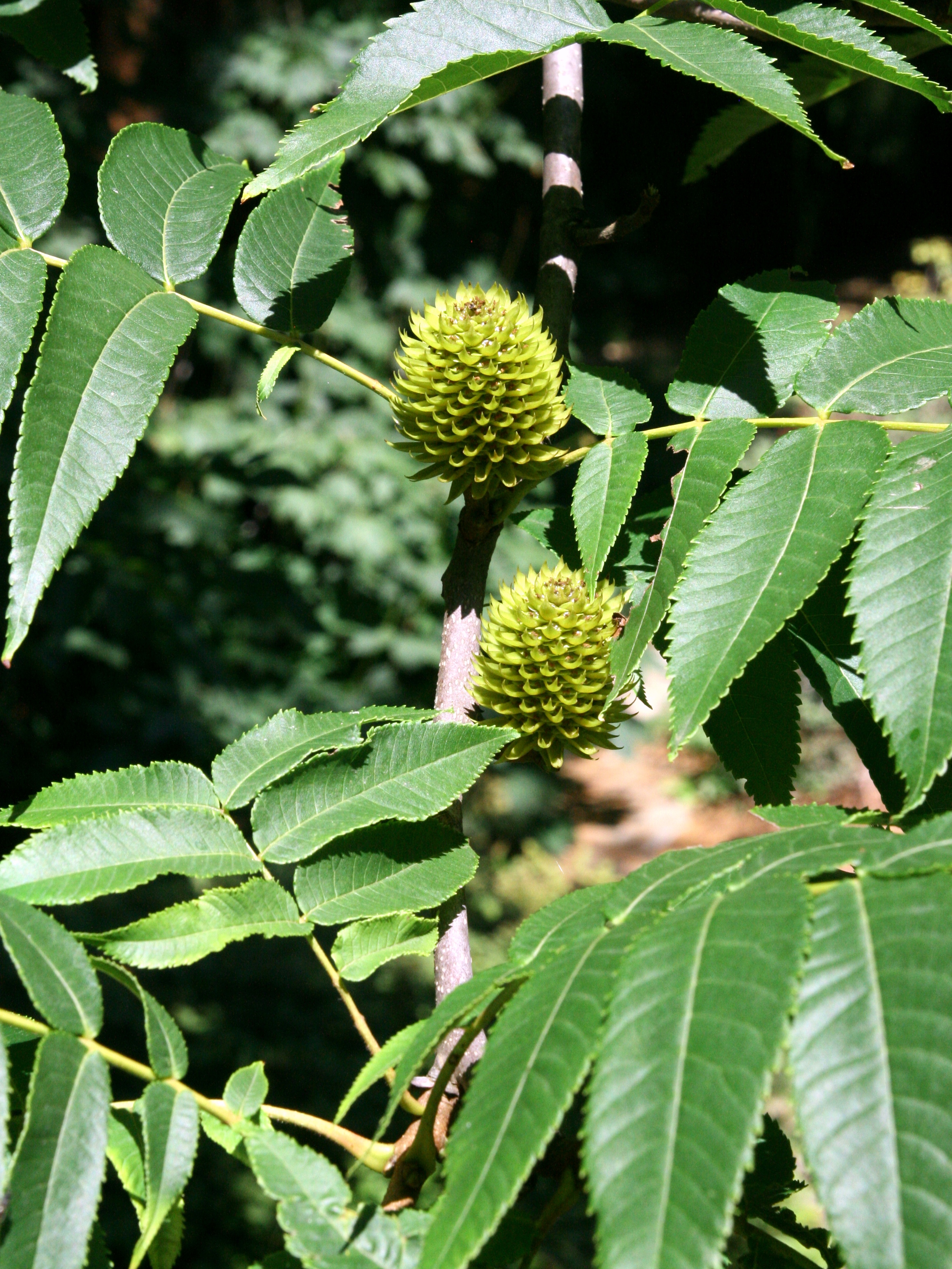 Platycarya strobilacea, Arboretum in Brno, Czech Republic